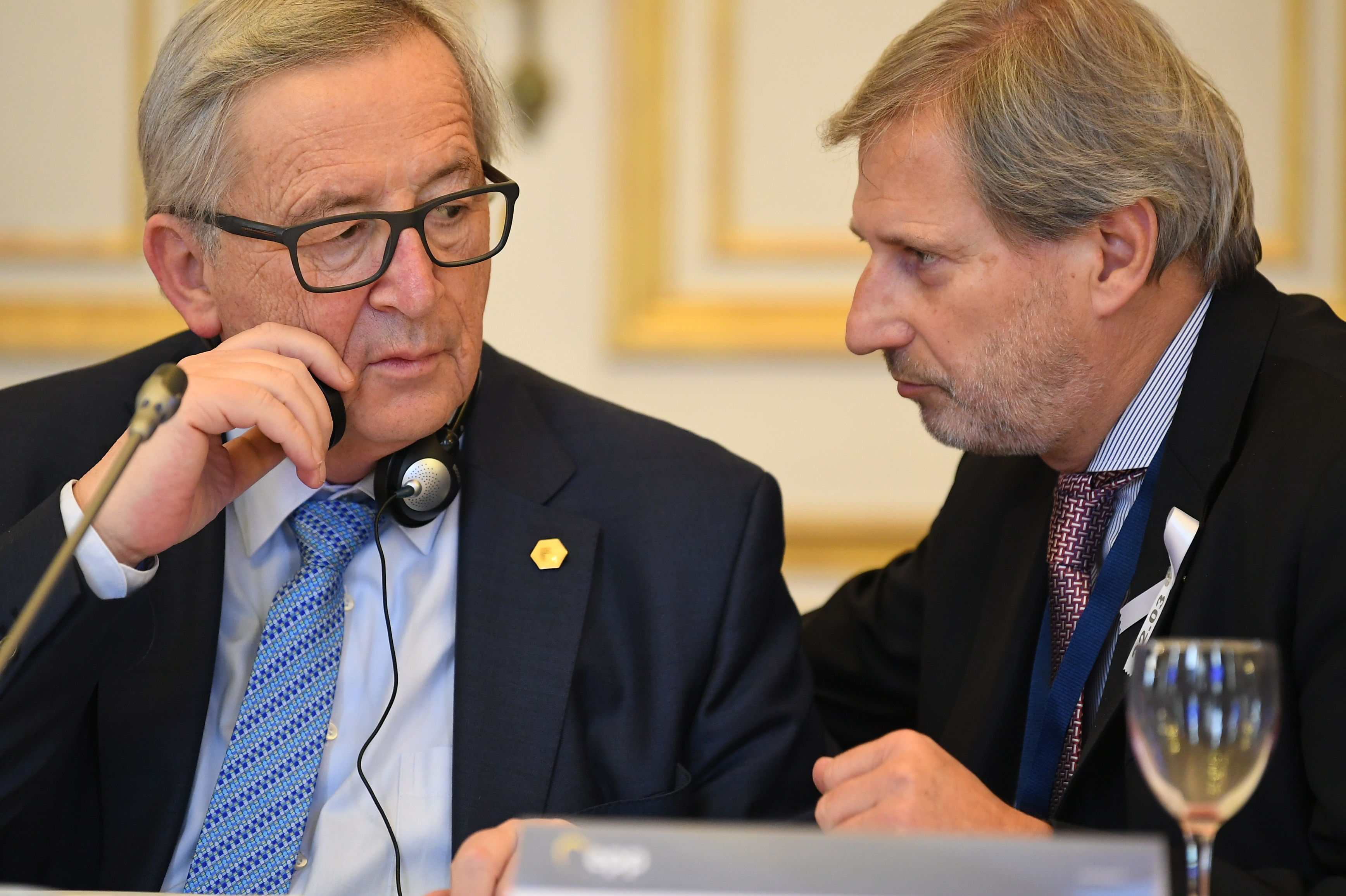 EPP Summit, 22 March 2018